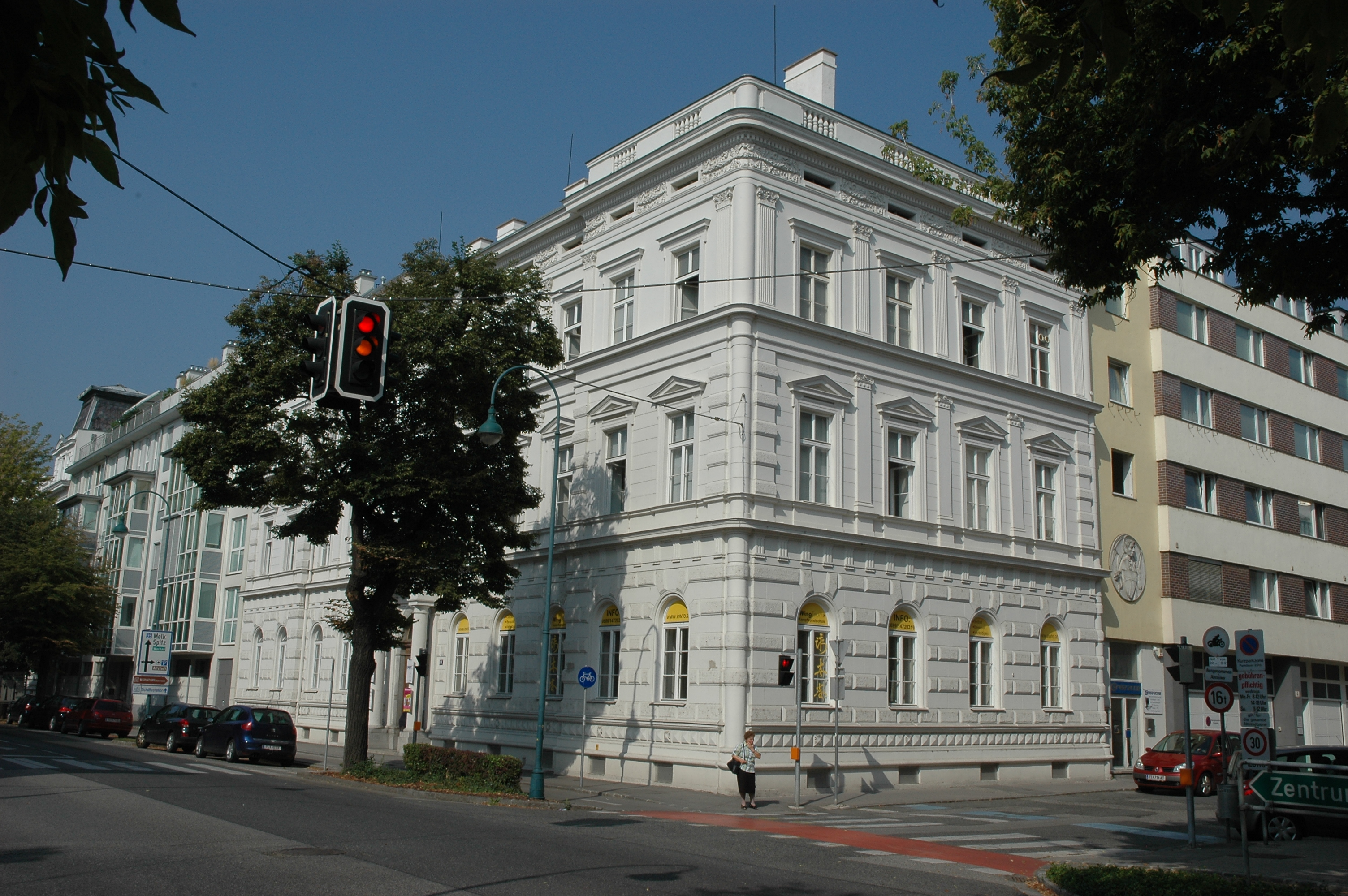 Ringstraße 44, Krems an der Donau